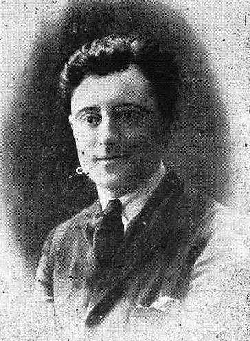 Juan Baliño Ledo, fotografía en Vida Gallega 1923